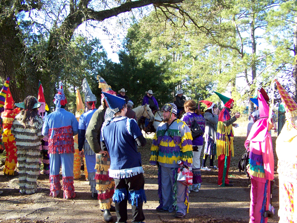 Courir de Mardi Gras in Savoy, Louisiana 2010.